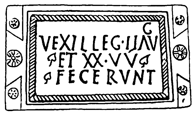 RIB I 852: Bauinschrift aus Maryport, frühes 3. Jh.